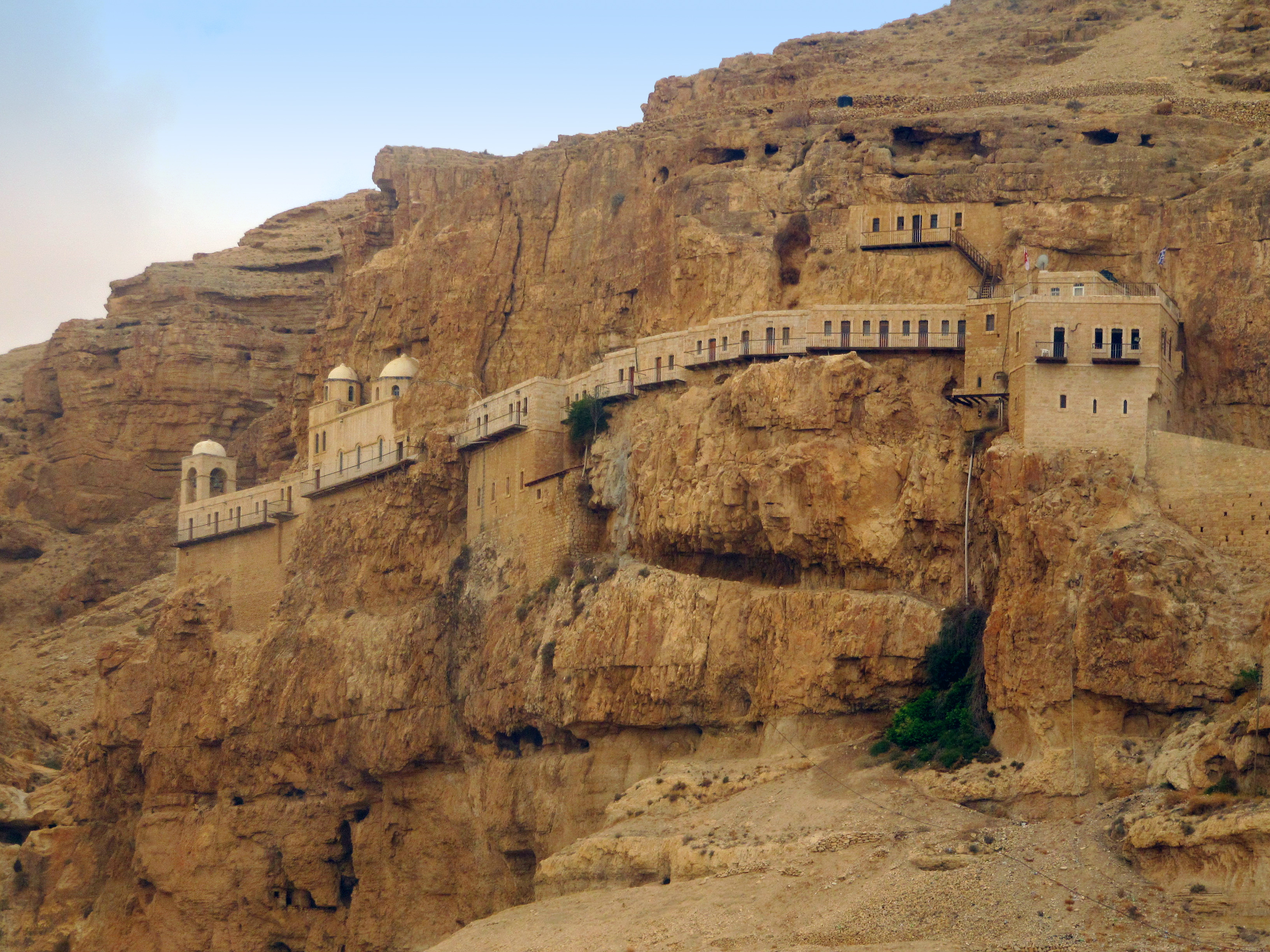 Jericho (more details in the photo's title) יריחו (מידע נוסף בשם הקובץ)